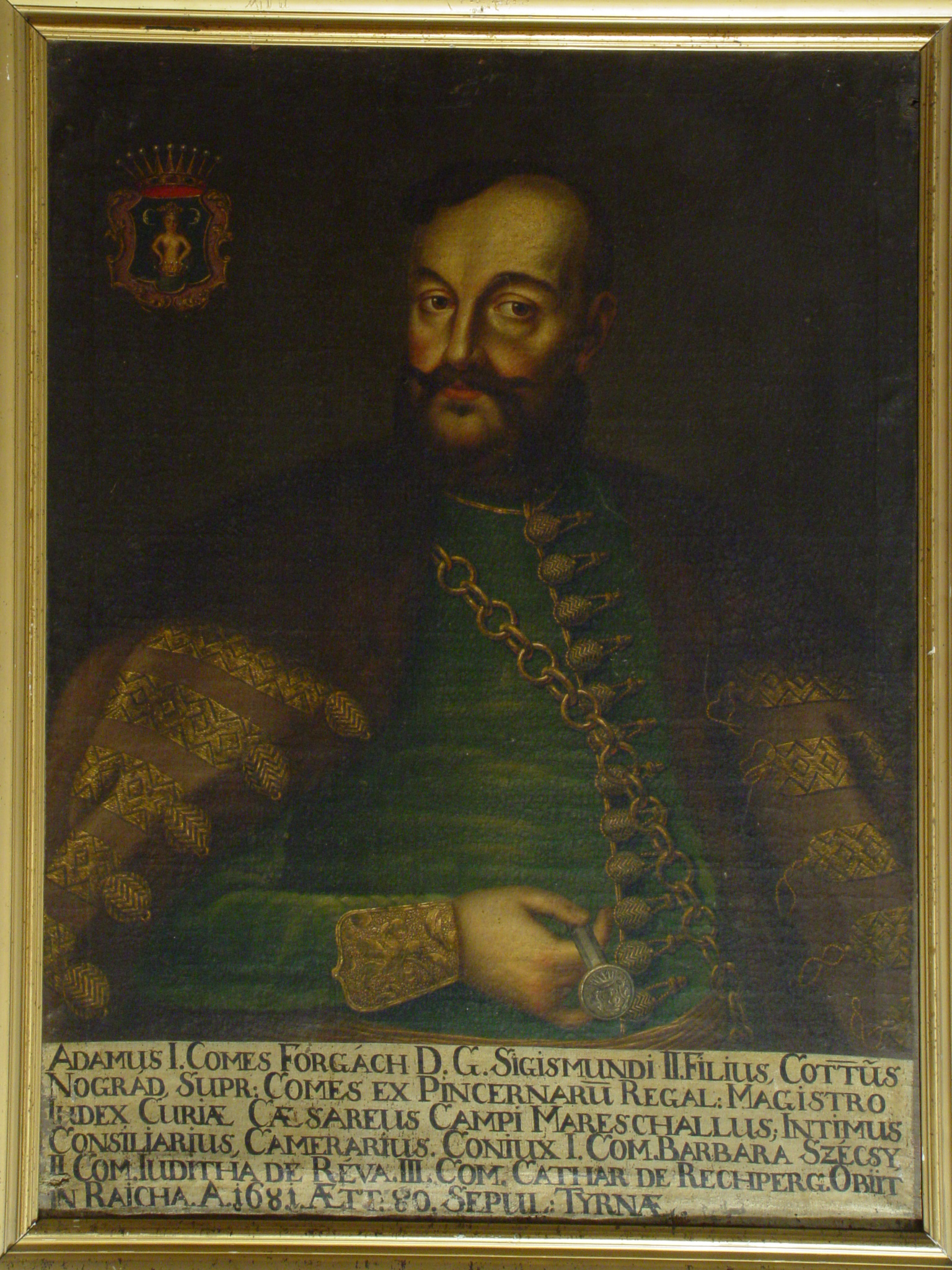 Ghymesi és gácsi gróf Forgách Ádám (1601–1681) magyar földbirtokos, várkapitány és országbíró portréja